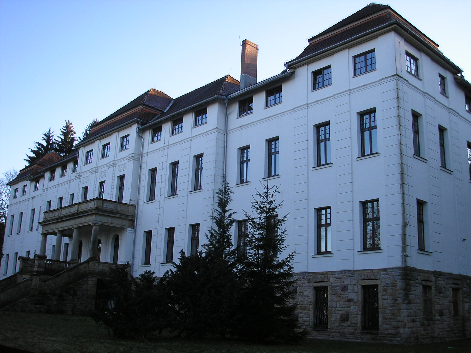 Das Haus I des Goethegymnasiums in Ilmenau (Thüringen).